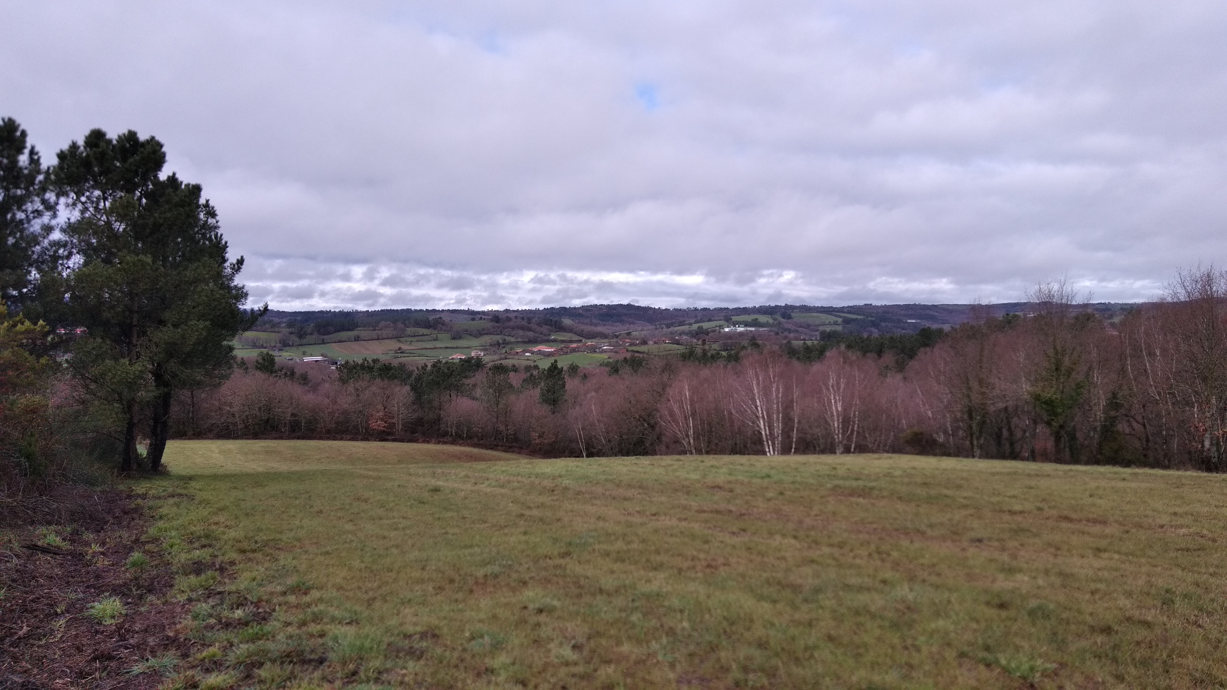 lugar de Barrio, na parroquia do Sisto (Dozón)